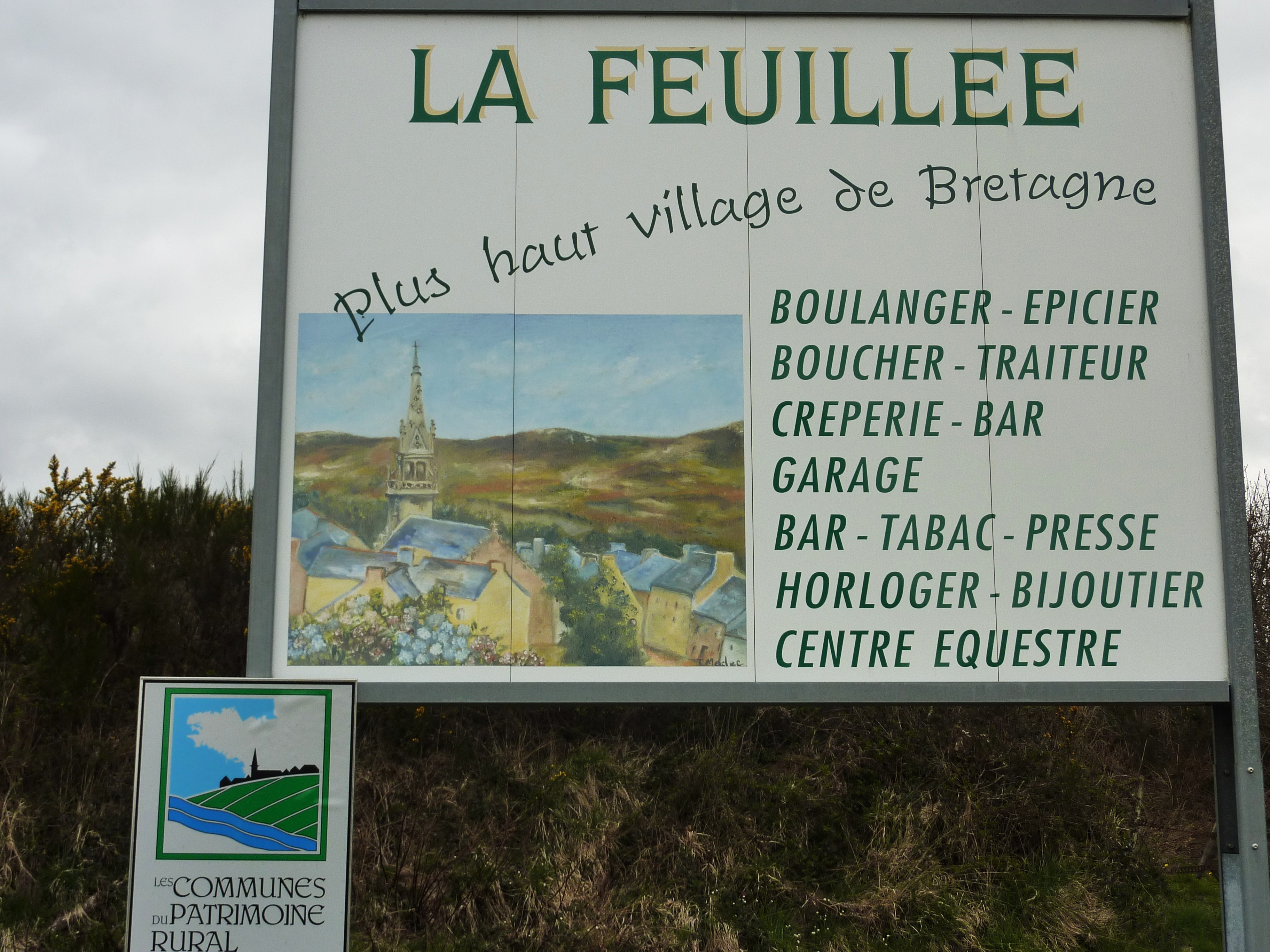 La Feuillée le plus haut village de Bretagne